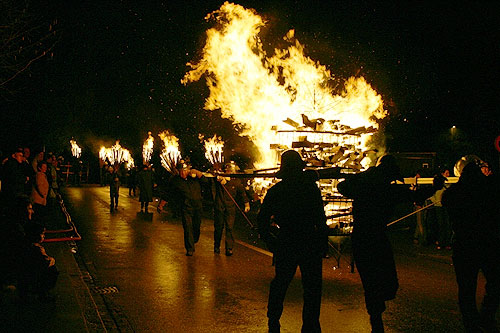 Liestal: Chienbäse-Umzug am Fasnachtssonntag